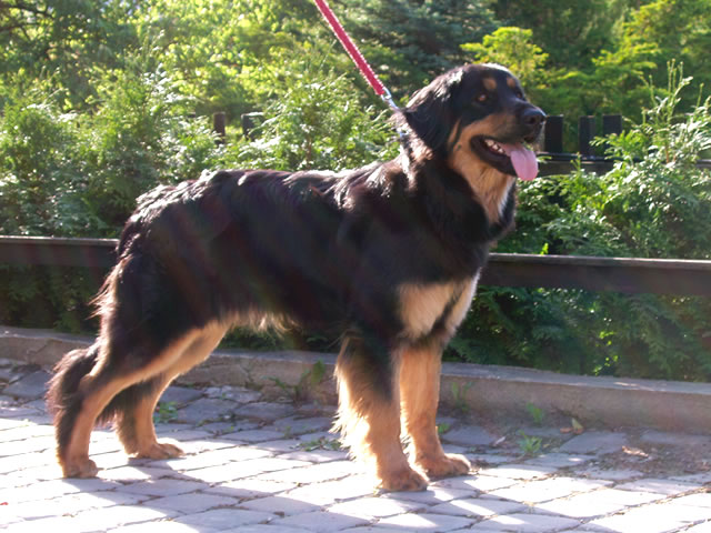 Ein schwarzmarkener Hovawart